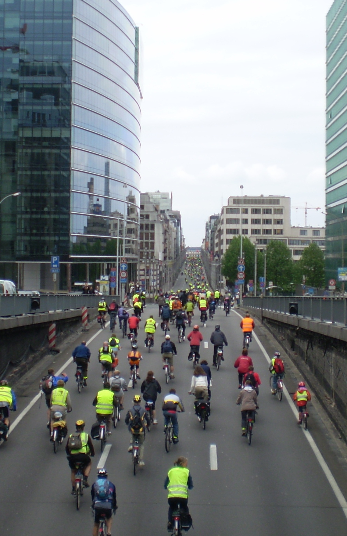 Masse critique à Bruxelles (BicyCity), groupement de cycliste revendiquant une meilleure place en ville, passage rue de la Loi